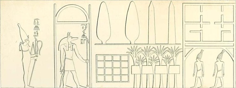 Relief an der Ostwand im Grab des Renni (EK7) in el-Kab, Ägypten